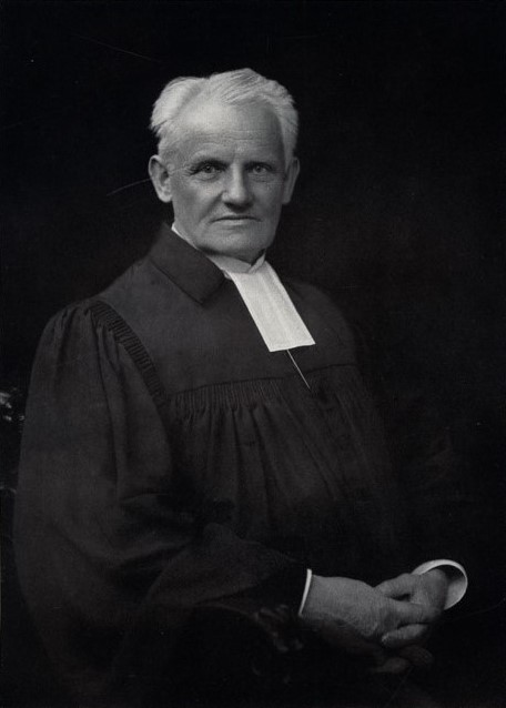 Portrait des Theologen und Politikers Ernst Dryander von Wilhelm Fechner